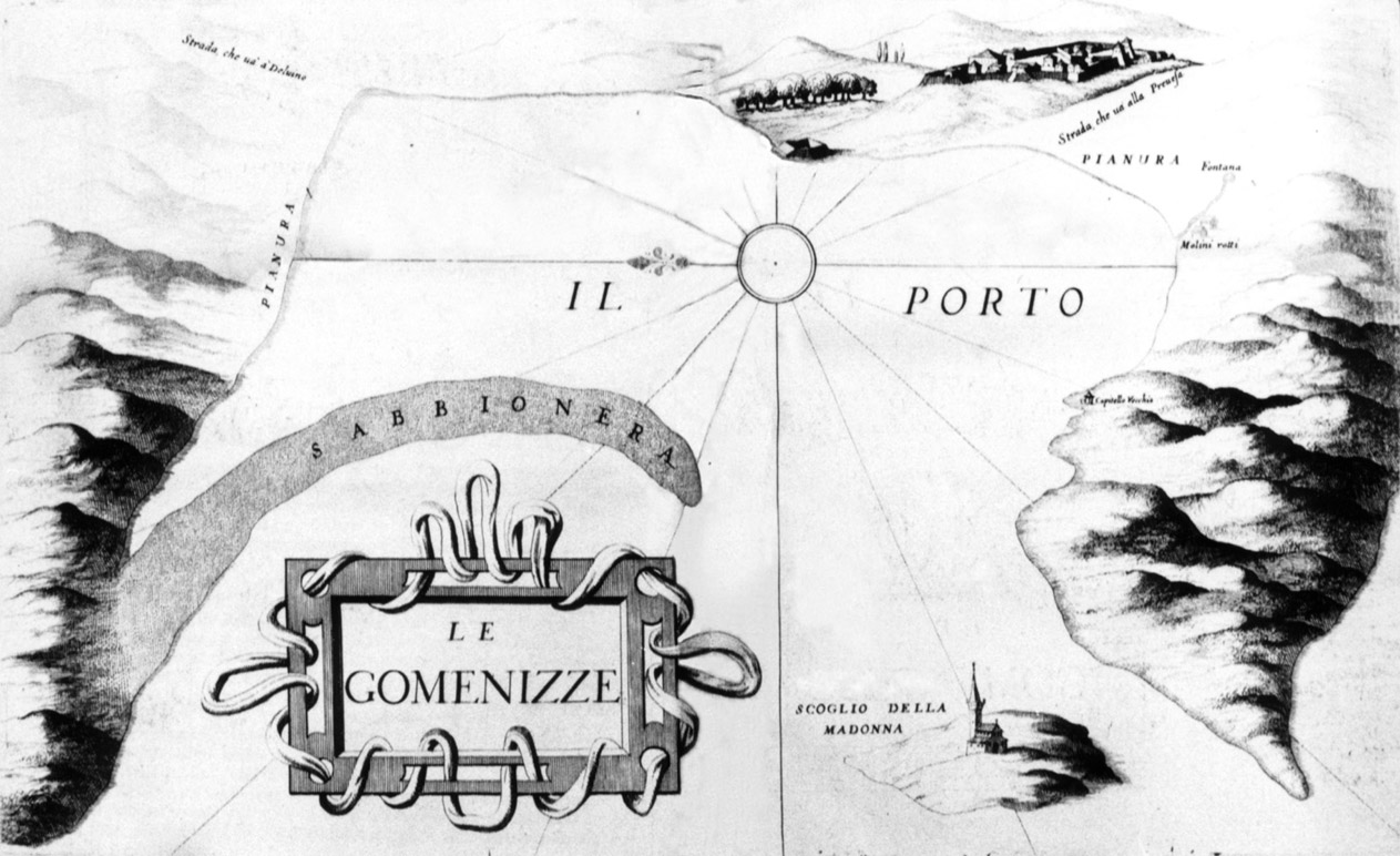 Χάρτης του Coronelli, 1692